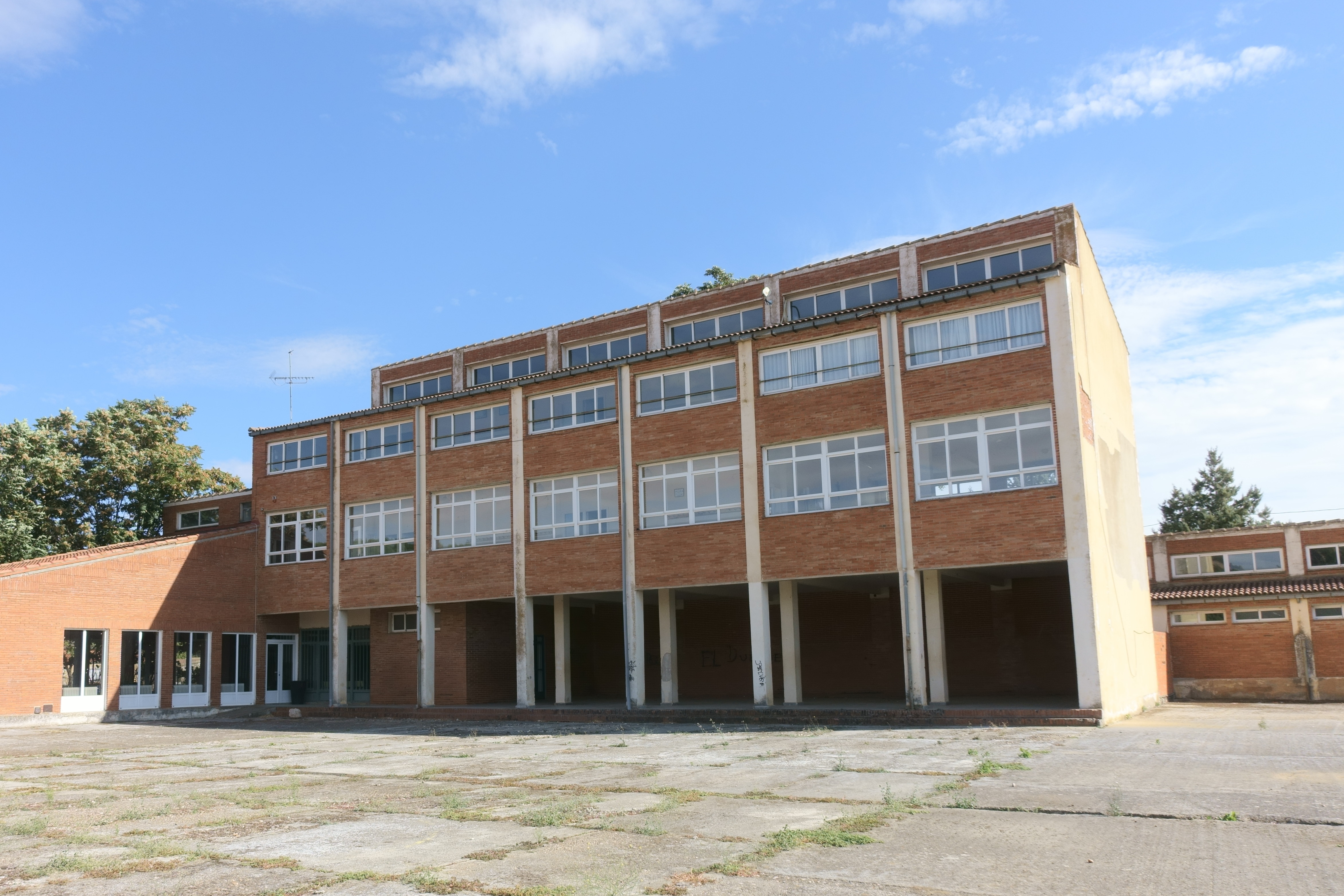 Colegio de Belver de los Montes (Zamora, España).